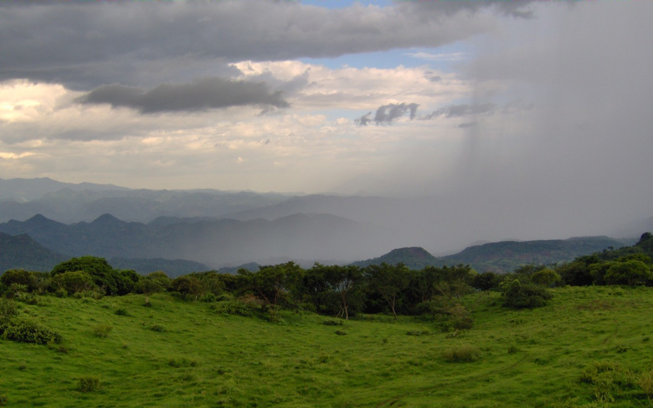 Invierno en Magdalena, Intibuca, Honduras